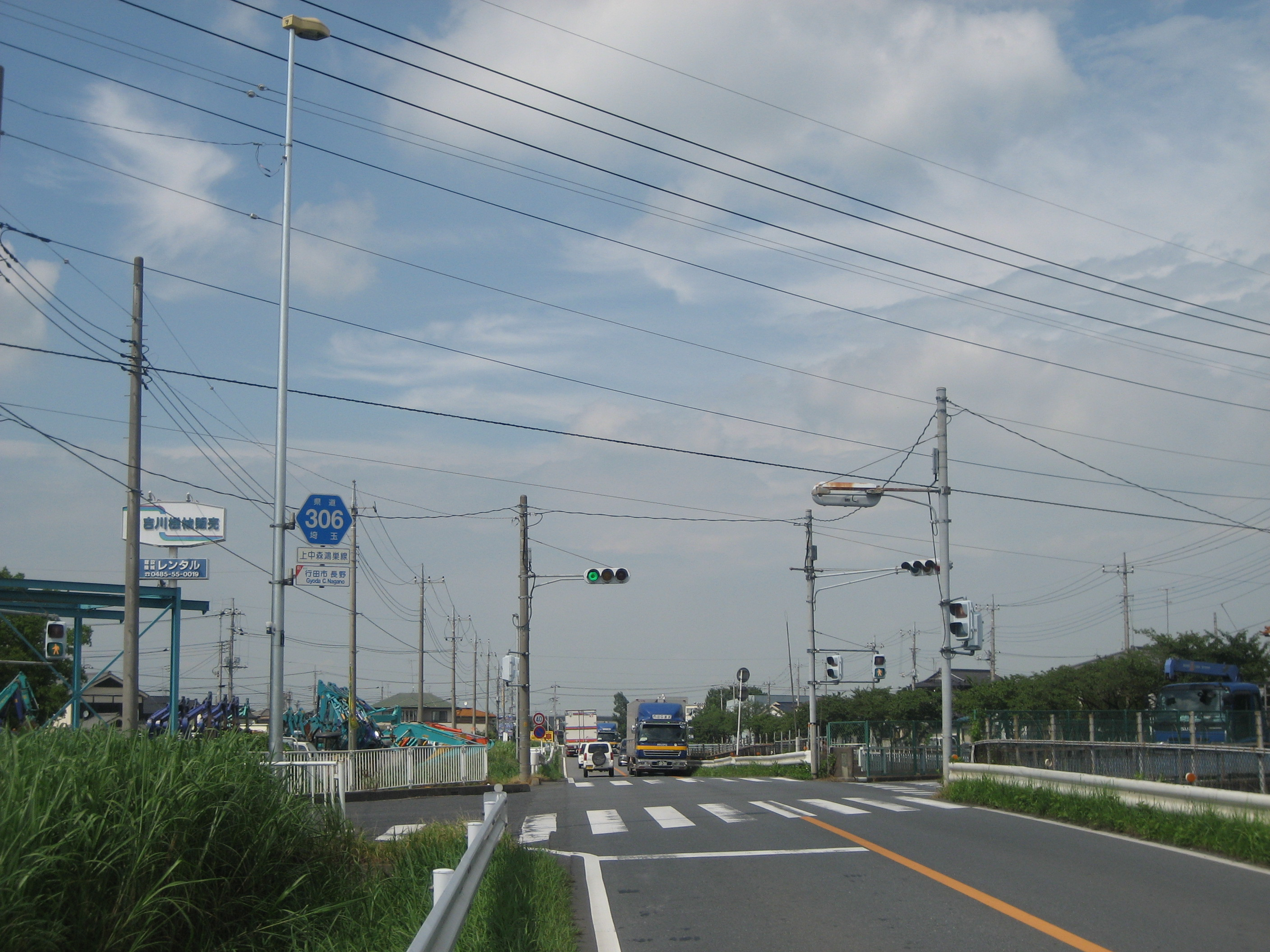 埼玉県道306号線行田市内